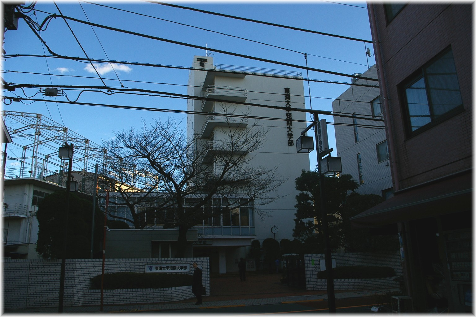 Ich machte dieses Foto von mir in 2006. 東海大短大